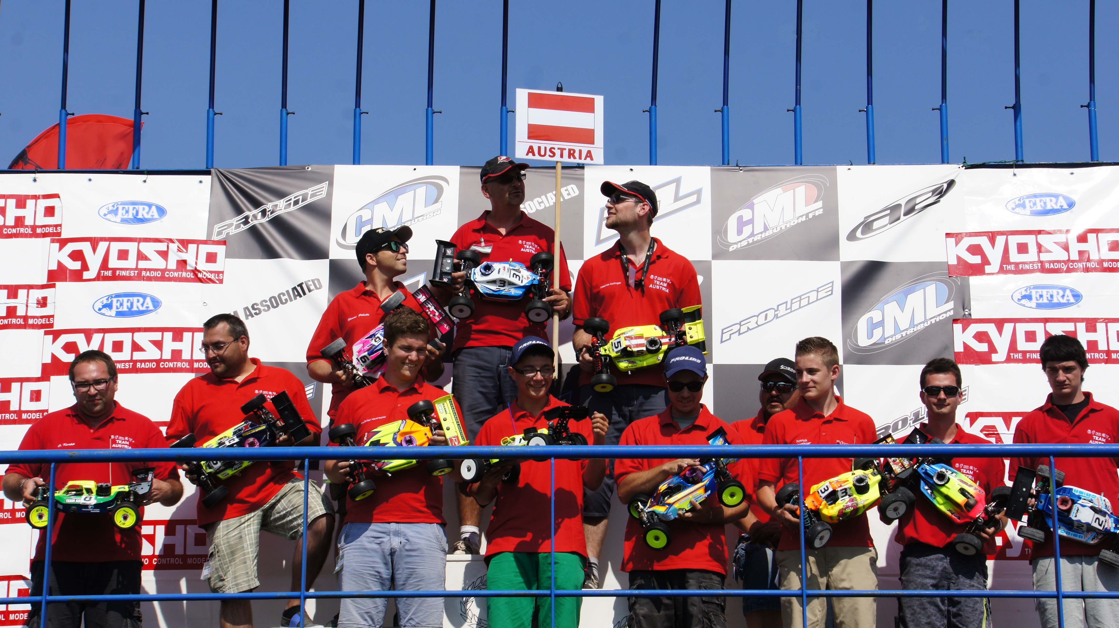 Lors du championnat d'Europe EFRA 2013 à Reims.